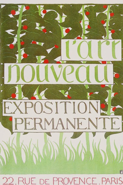 Affiche de Félix Vallotton pour les galeries Bing (Paris).